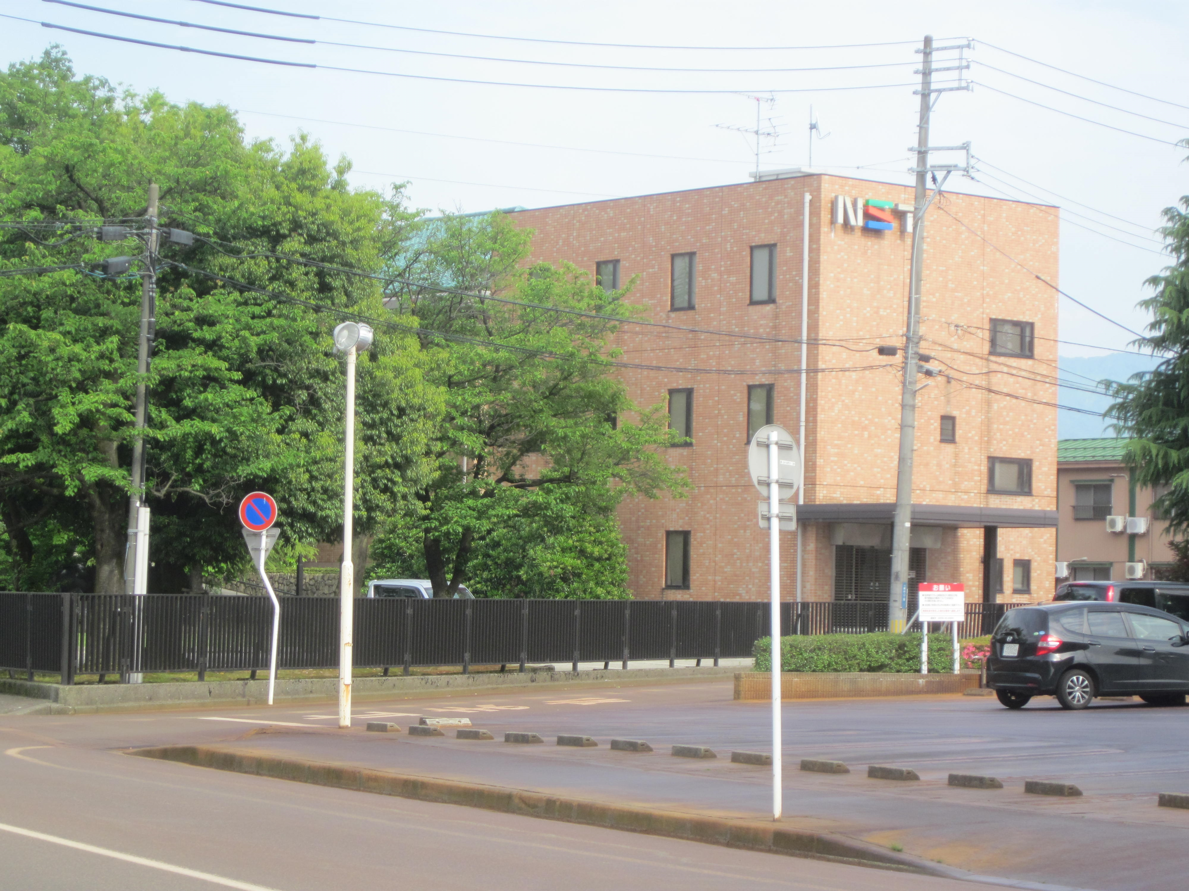 新潟総合テレビ長岡支社（新潟県長岡市今朝白二丁目1-4）。2016年5月29日、投稿者が撮影。